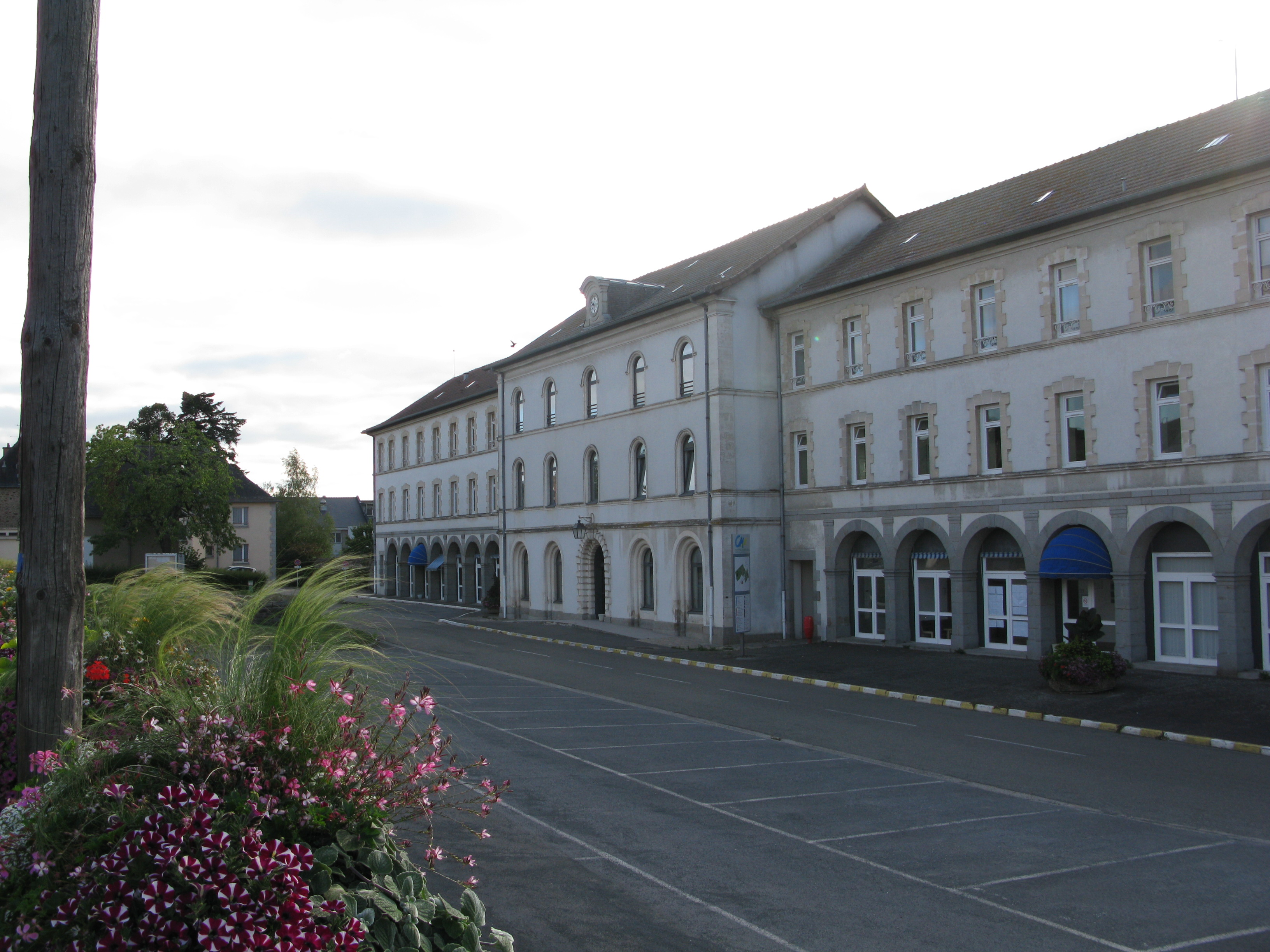 Façade de l'ancien hôpital de Mayenne.